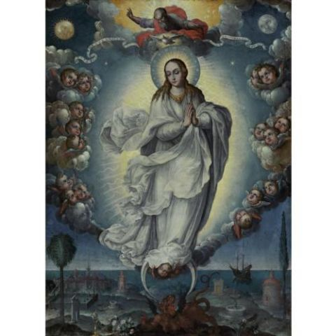 Inmaculada, óleo sobre lienzo, 52,7 x 38,7 cm. Colección particular.